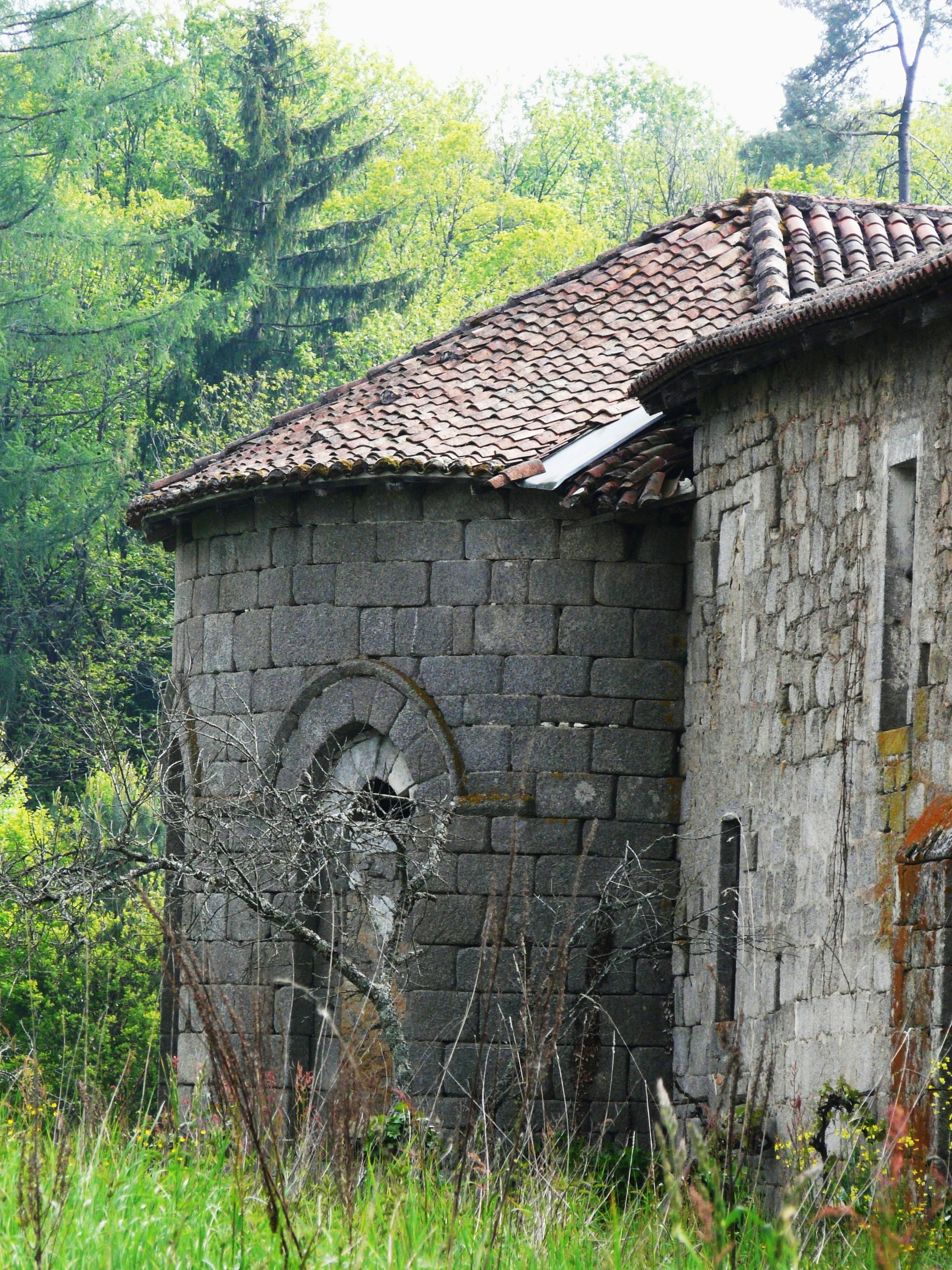 Le chevet de la chapelle, ancien prieuré de Badeix, Saint-Estèphe, Dordogne, France.